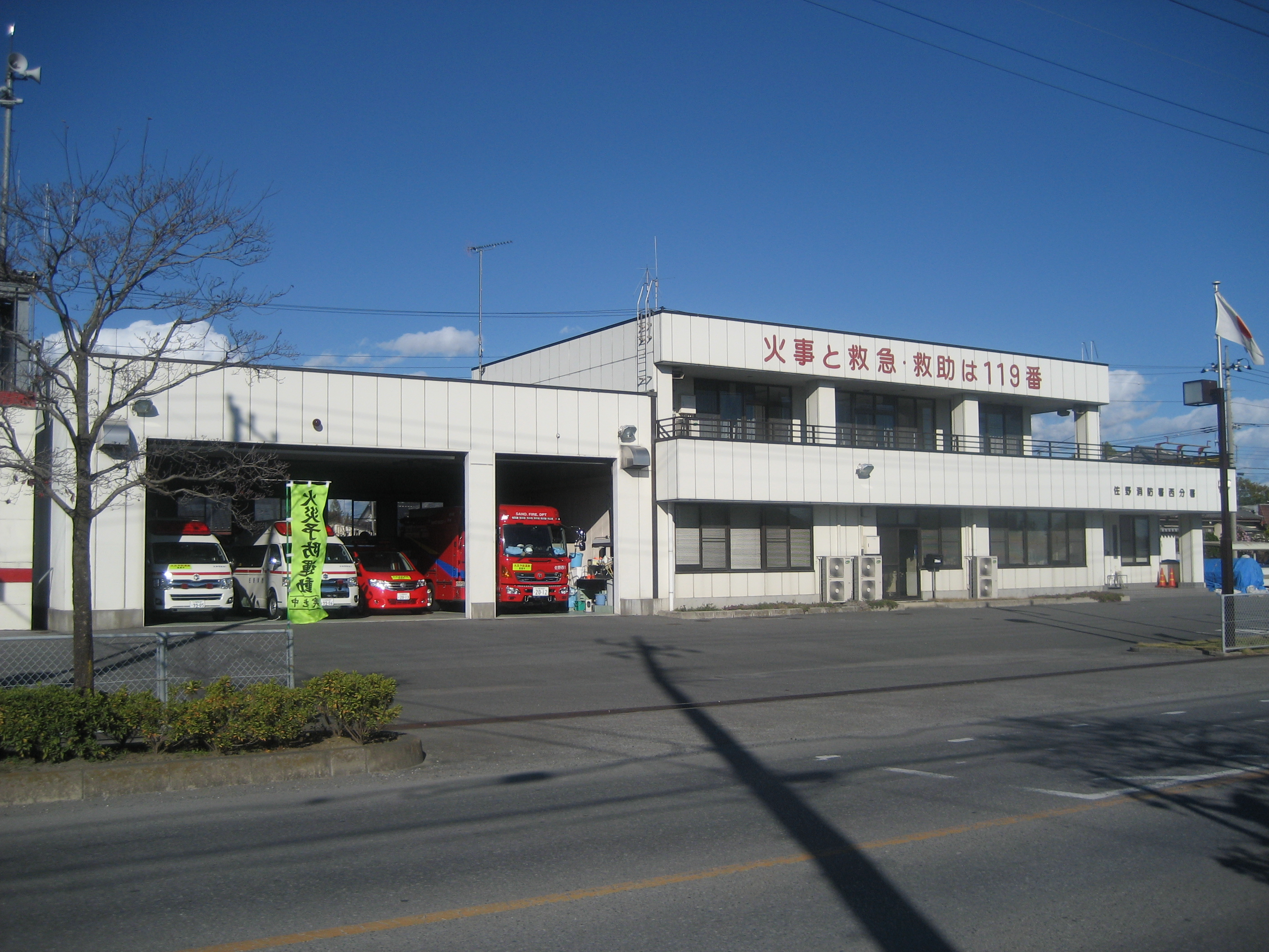 佐野市消防本部西分署庁舎